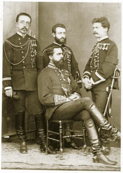 Fotografía de Don Carlos en Durango con sus oficiales de órdenes, de izquierda a derecha: desconocido, José Mª de Orbe y José Ponce de León.